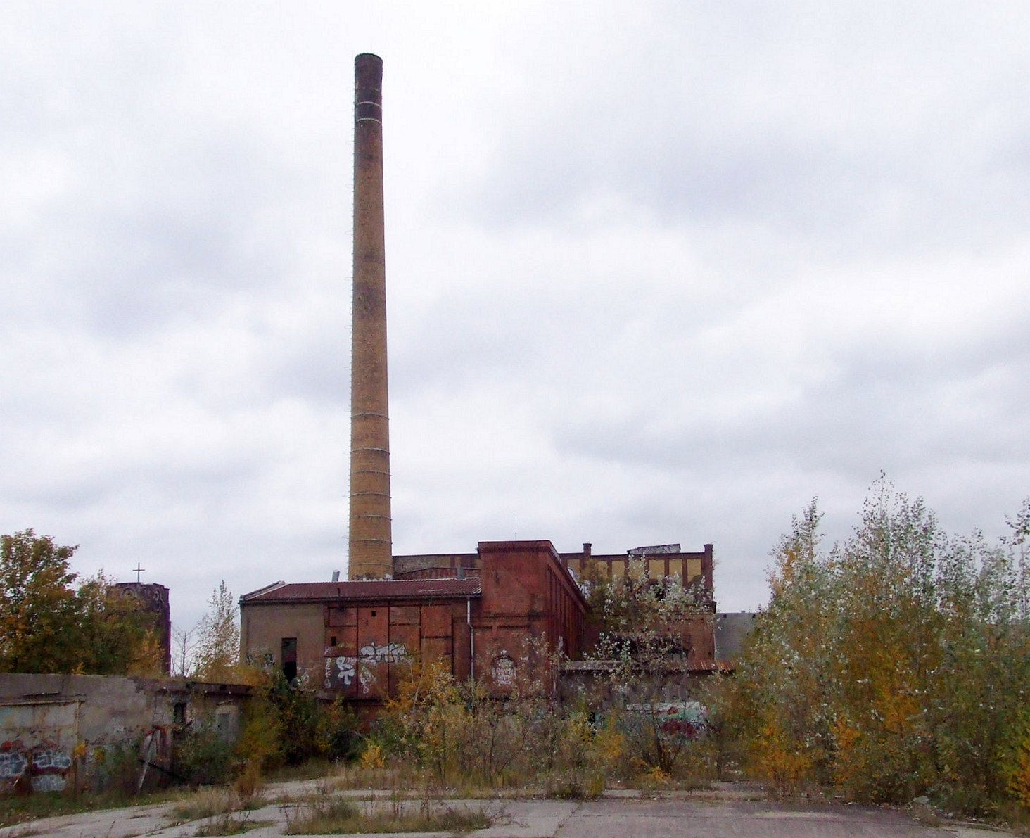 Böhmisches Brauhaus Berlin